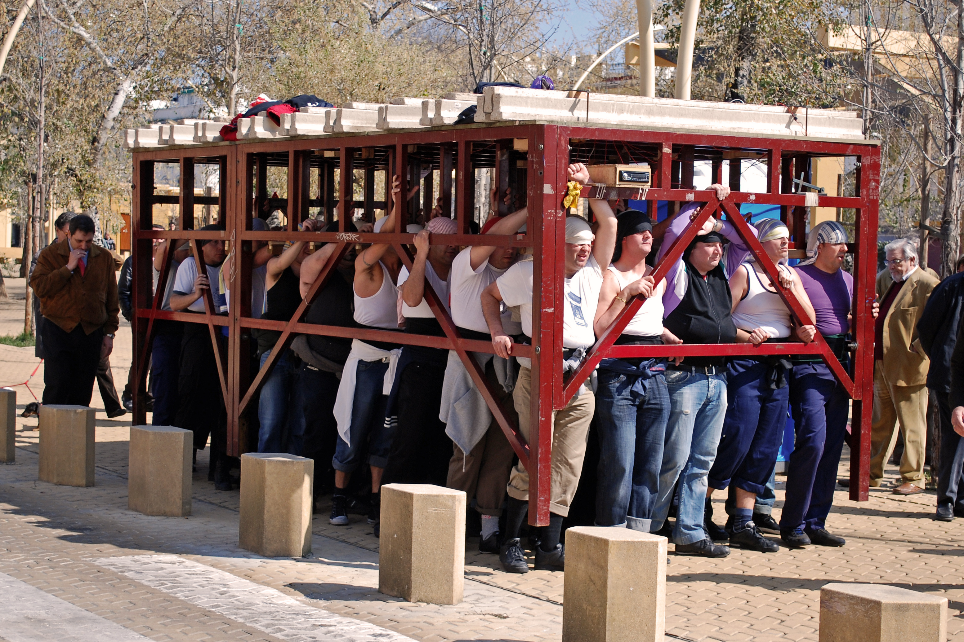 Ensayo de costaleros en la Alameda de Hércules, Sevilla.